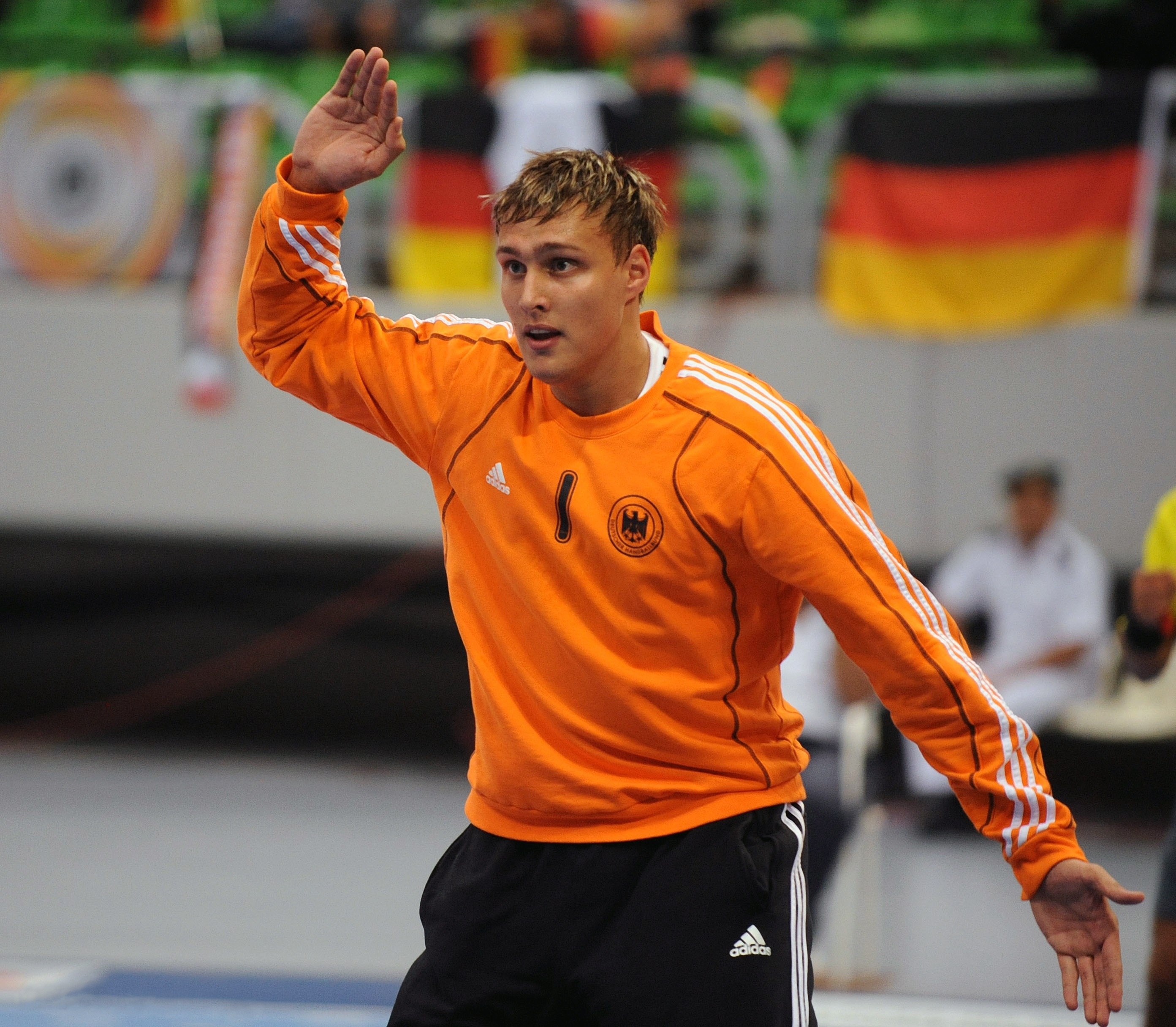 Dario Quenstedt